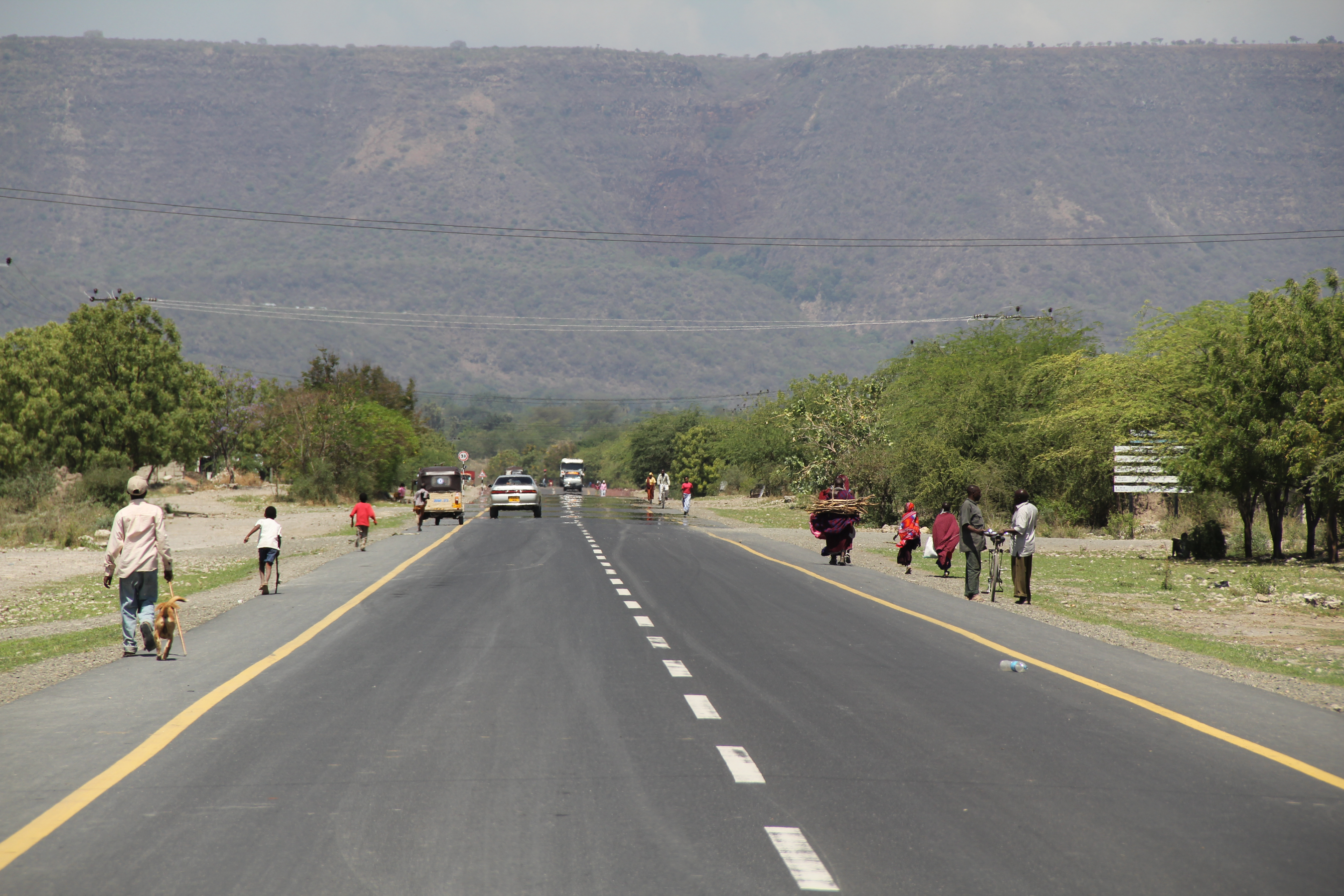 Highway in Tanzania